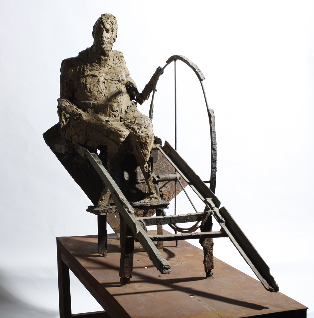 2005-2011. 116X70X150